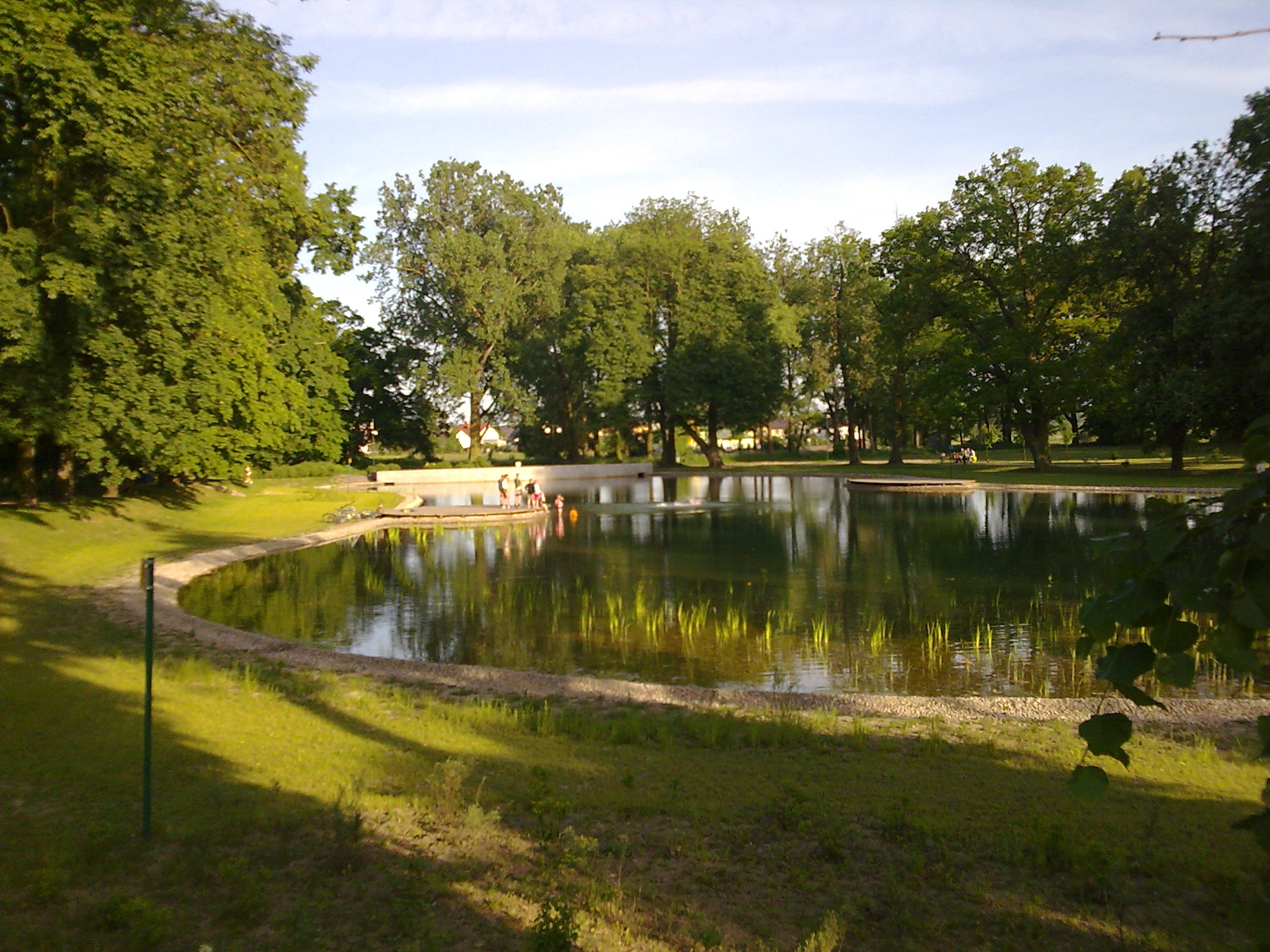 Park miejski im. Jana Pawła II w Ostrowi Mazowieckiej